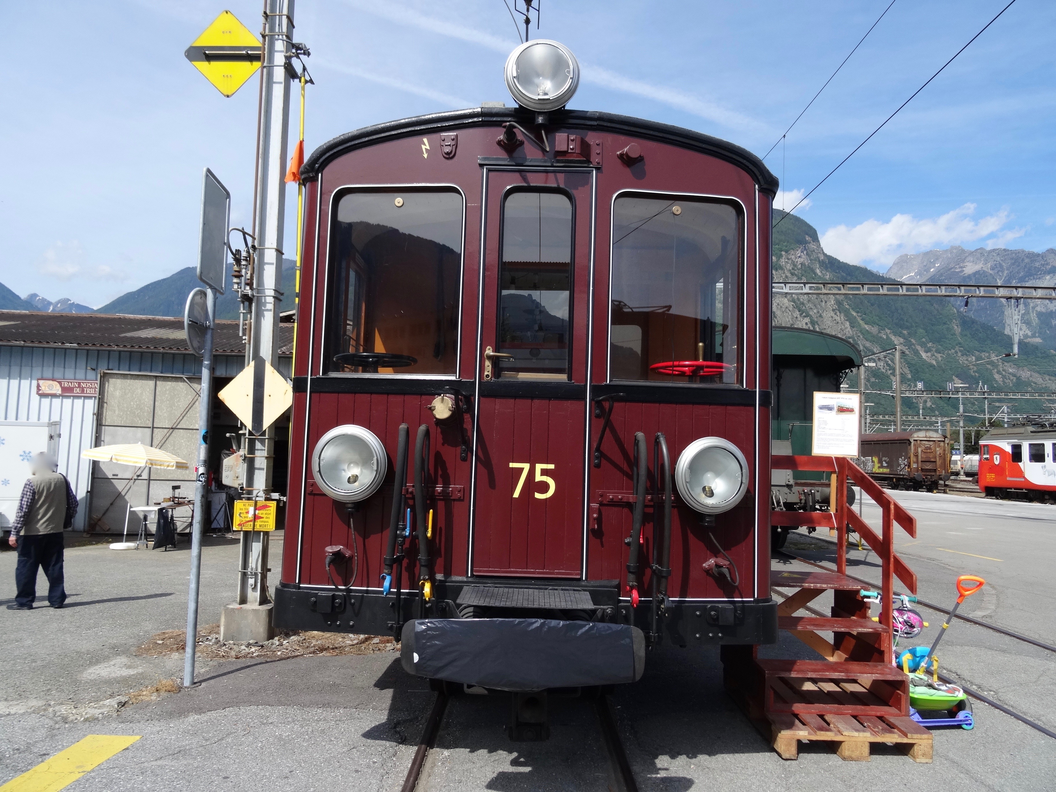 La voiture bt75 du Martigny-Châtelard à Martigny aux portes ouvertes du Train Nostalgique du Trient.